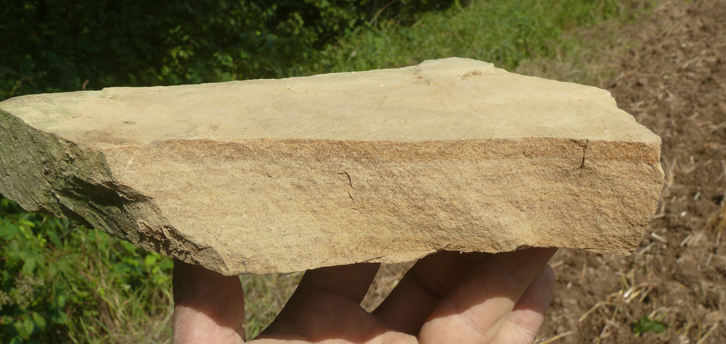 Angulatensandstein, Unterjura Spiegelberg, Deutschland